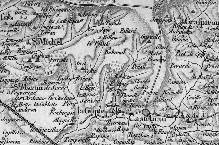 carte